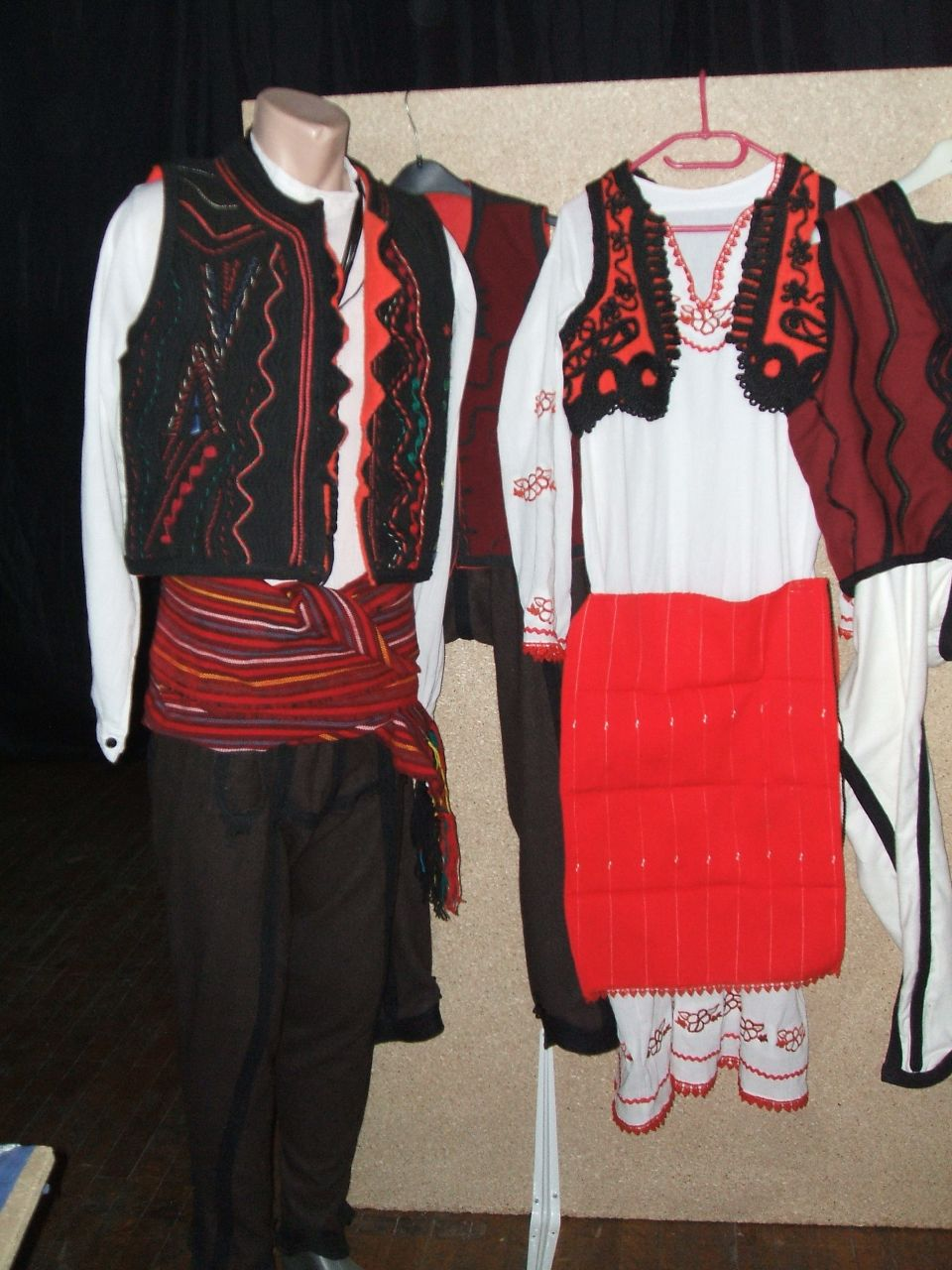 Kostume popullore